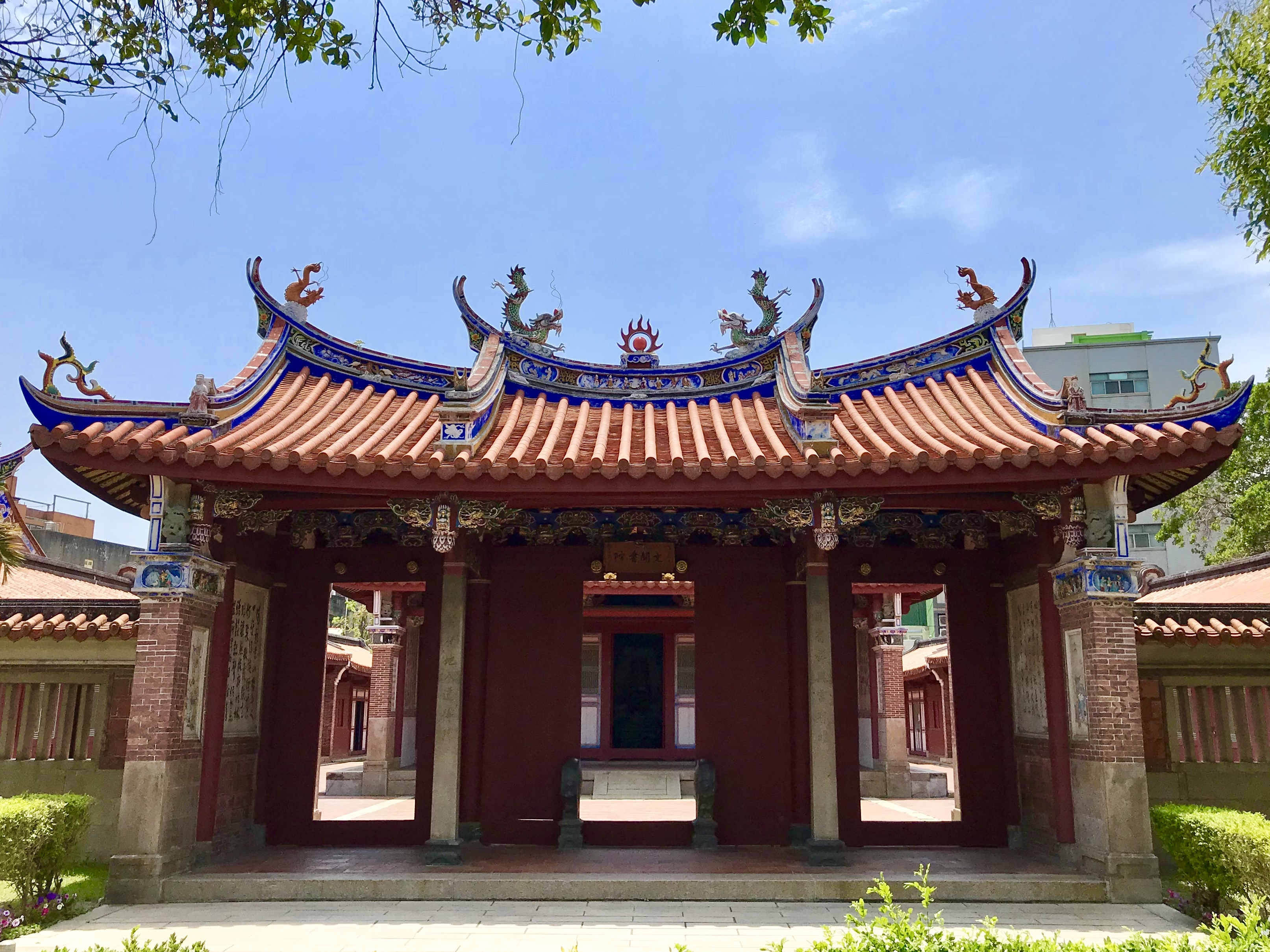 中文（台灣）: 文開書院三川門